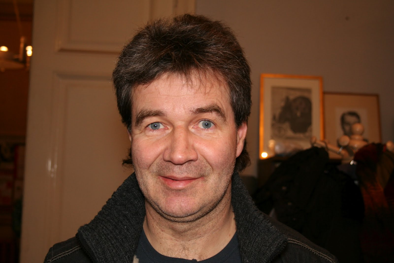 Hendrik Lindepuu Kirjanike Liidu korraldatud Kulka kirjanduse sihtkapitali aastaauhinna nominendide tutvustusesinemisel Tartus.